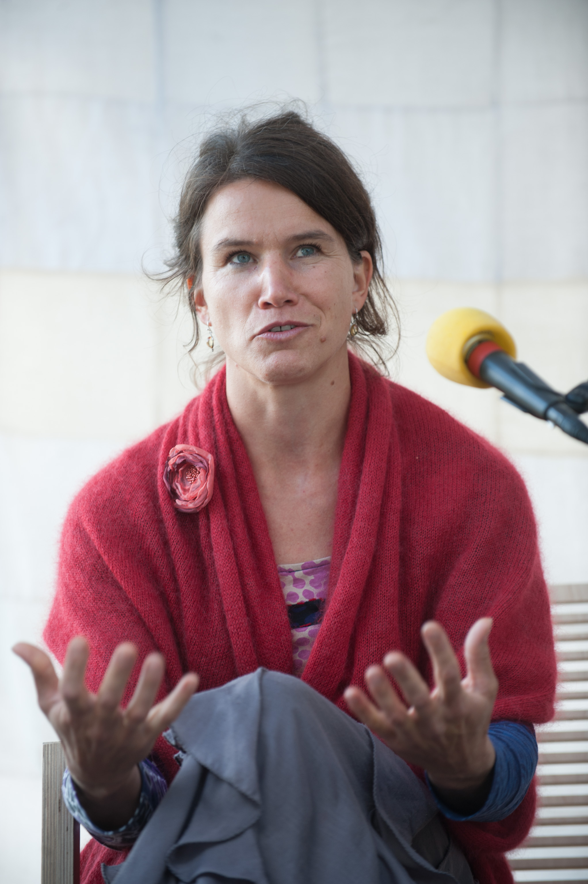 Arvamusfestival 2014: "Ärge õpetage mind elama, andke parem raha"